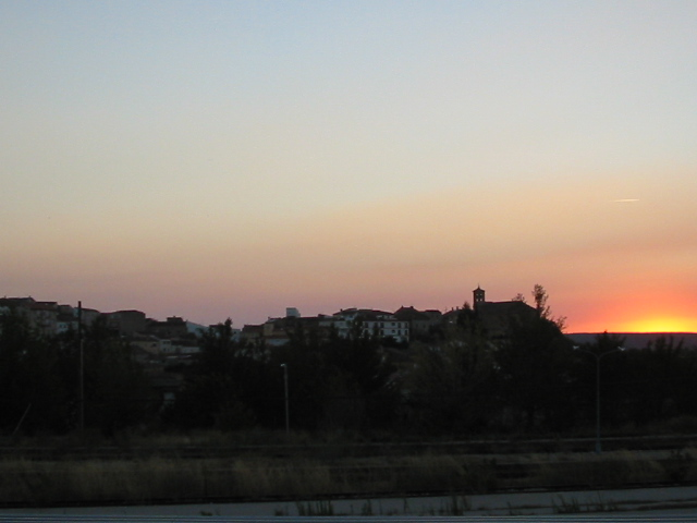 Carboneras de Guadazaón, en Cuenca (España)